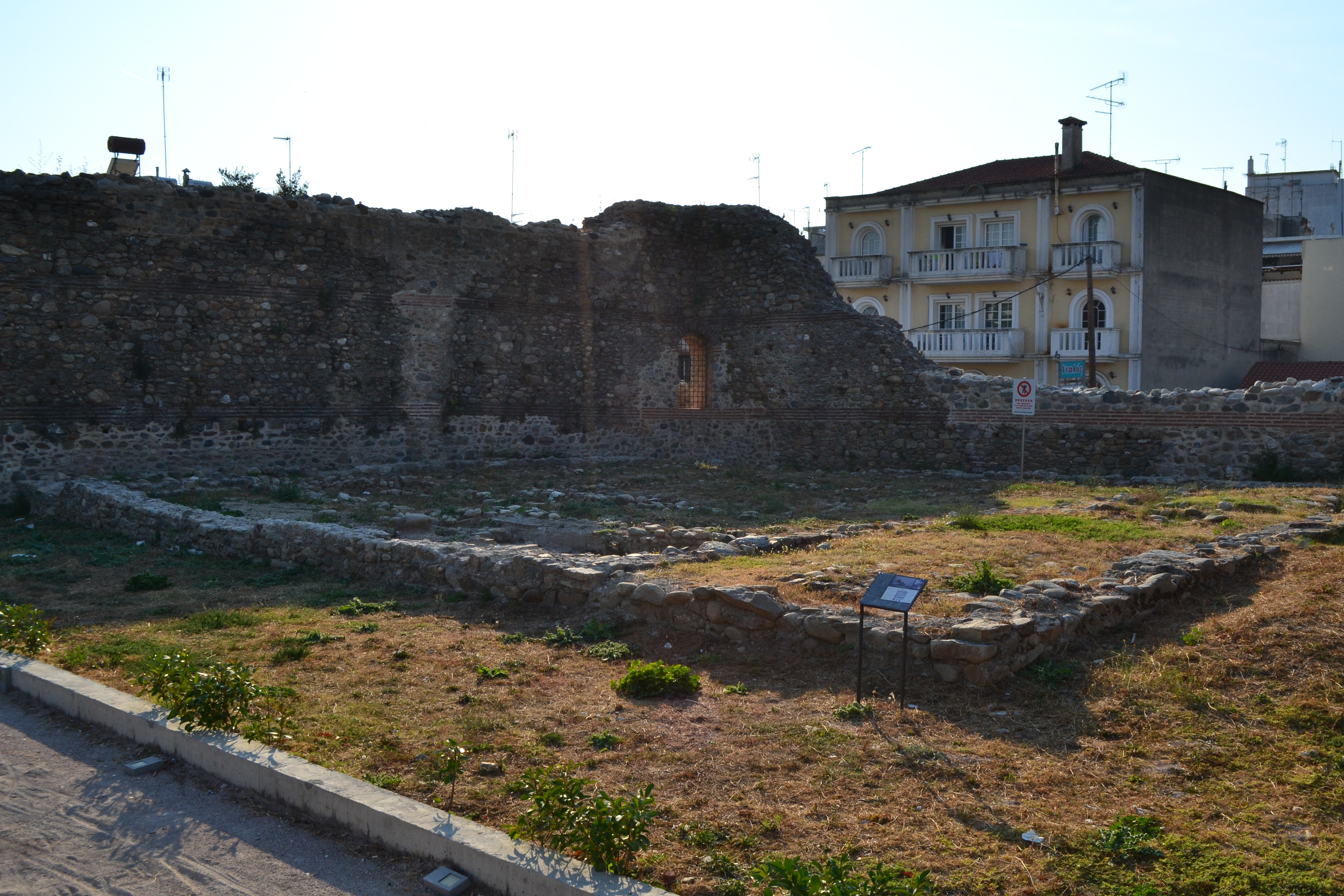 Συναγωγή Κομοτηνής (ερείπια)«Συναγωγή Κομοτηνής»